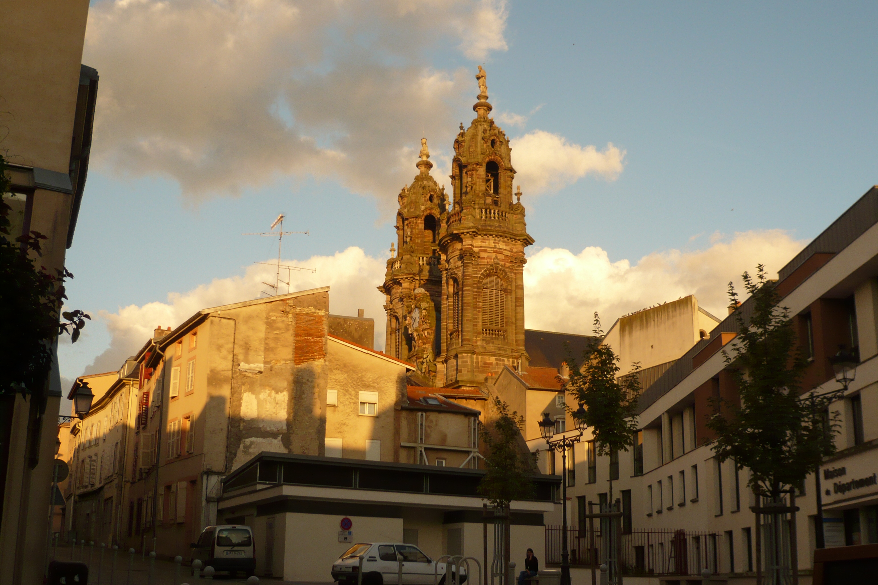 Église Saint-Jacques de Lunéville .